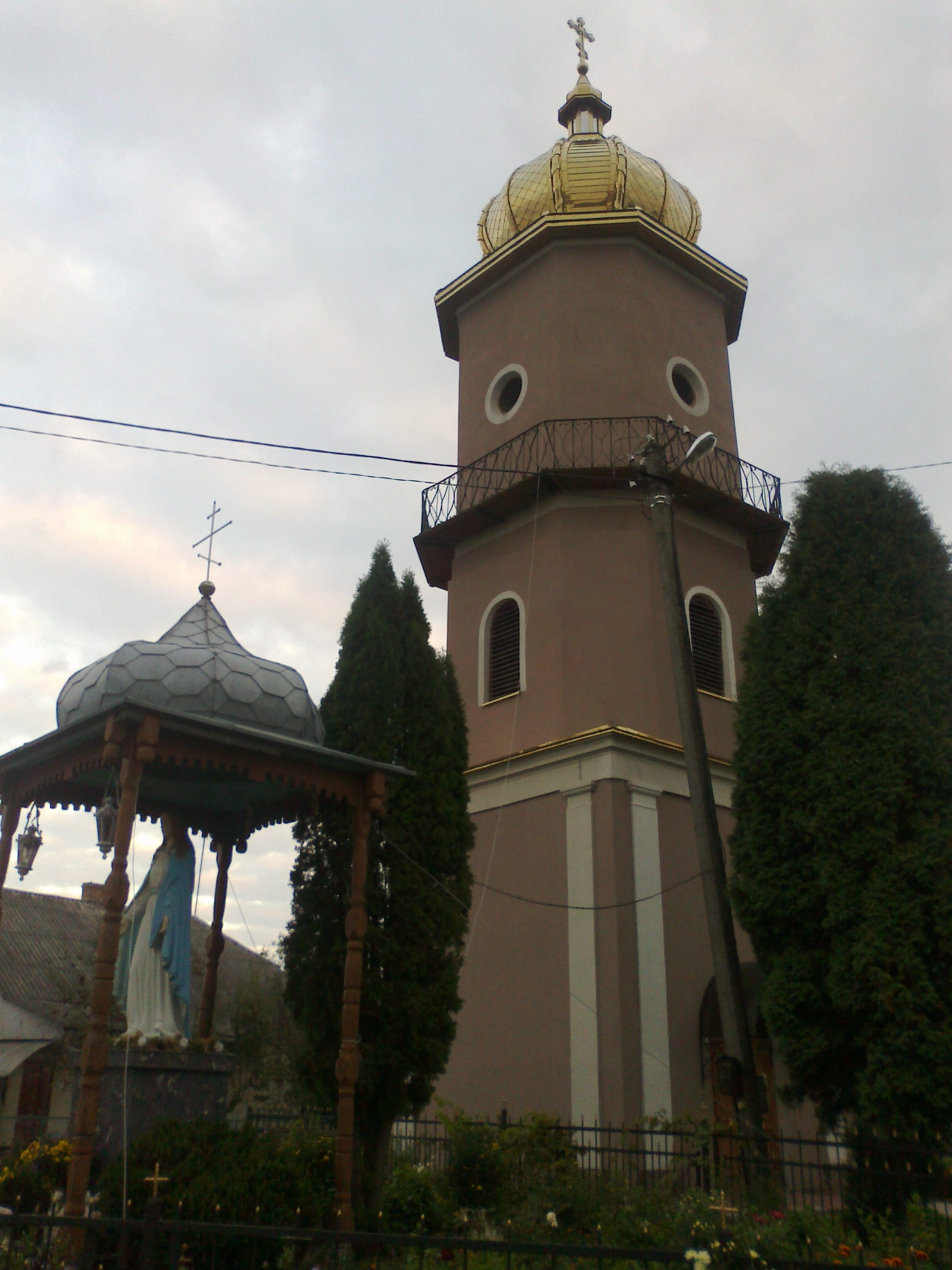 Дзвіниця Іванівської церкви